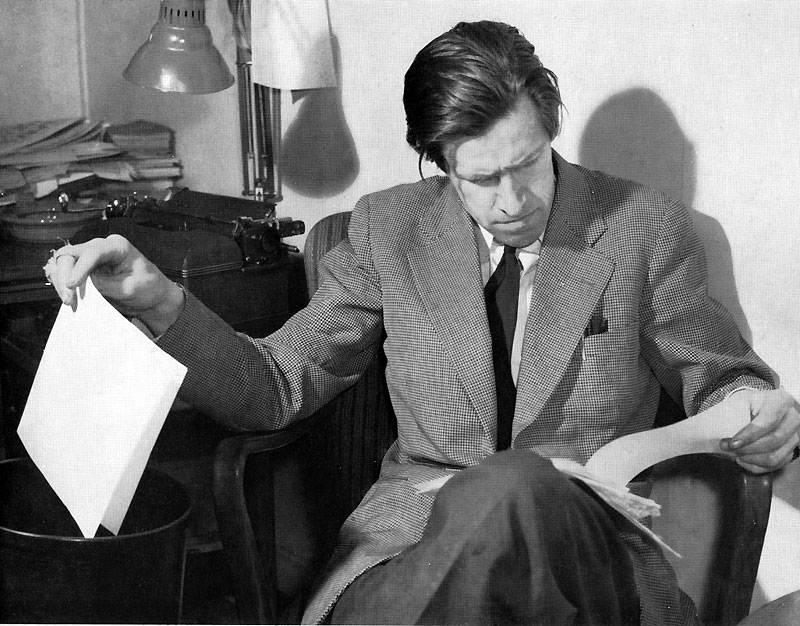 Birger Vikström